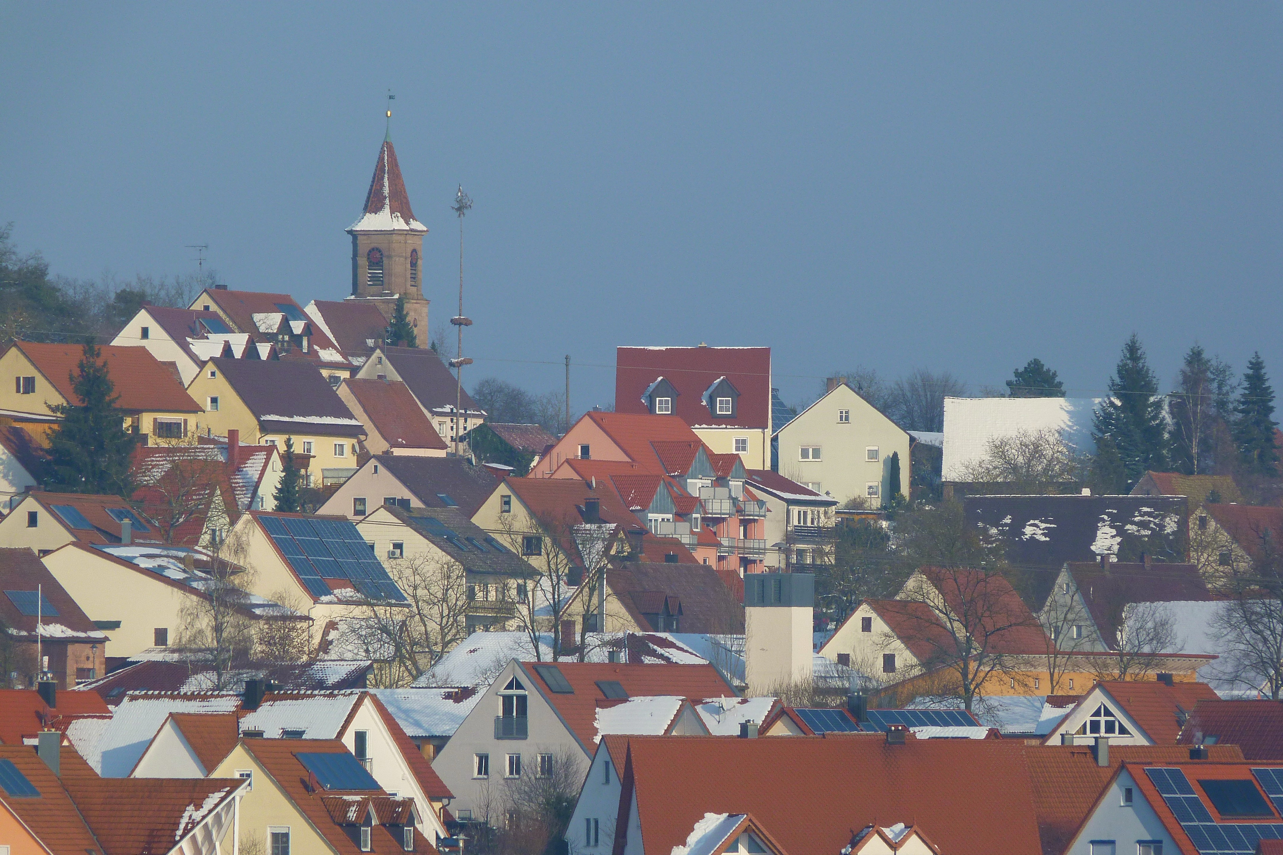 Kammerstein